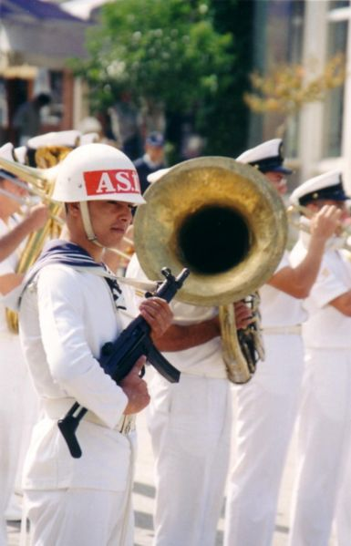 Military Orchestra, Büyükada, Turkey